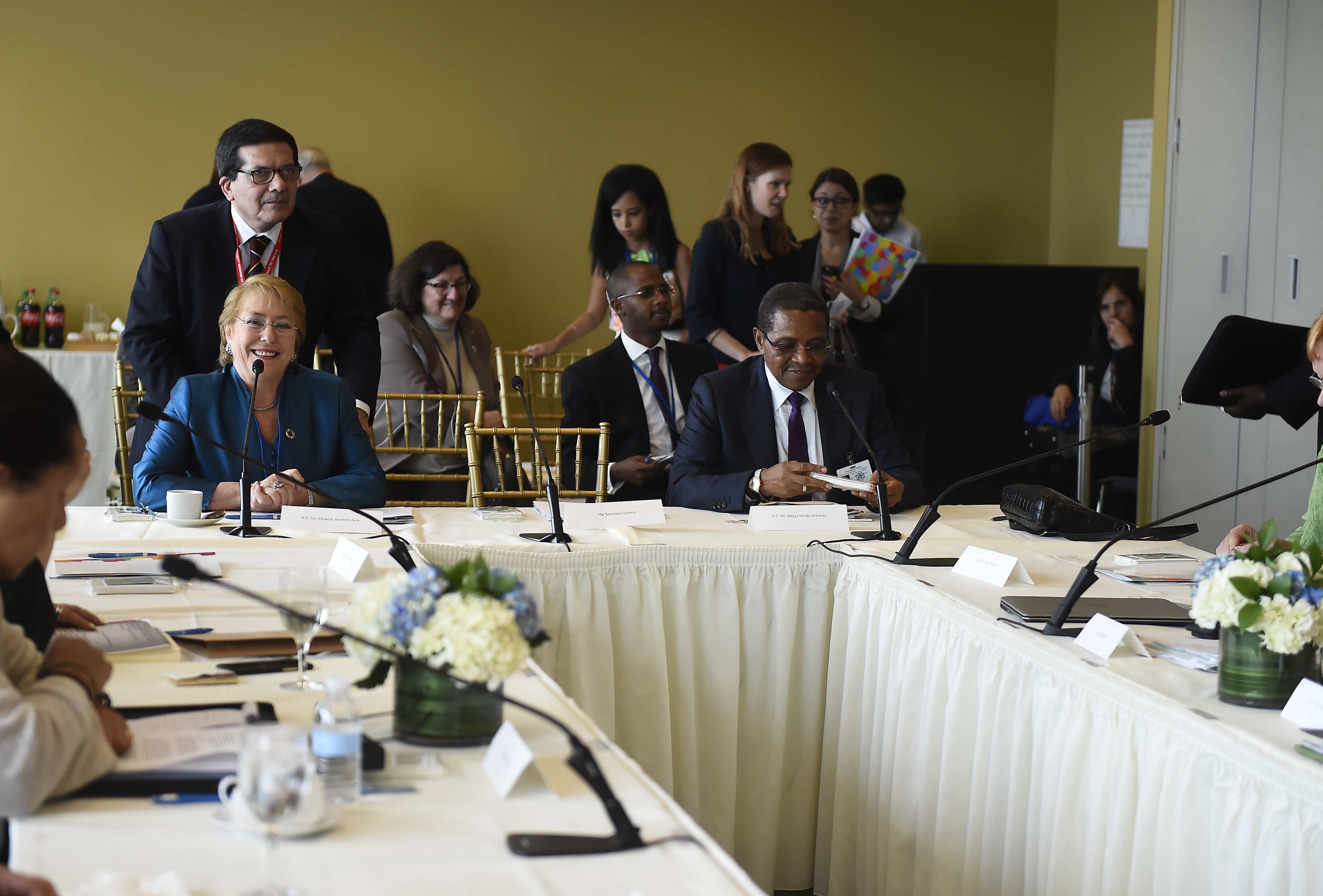 Gobierno de Chile